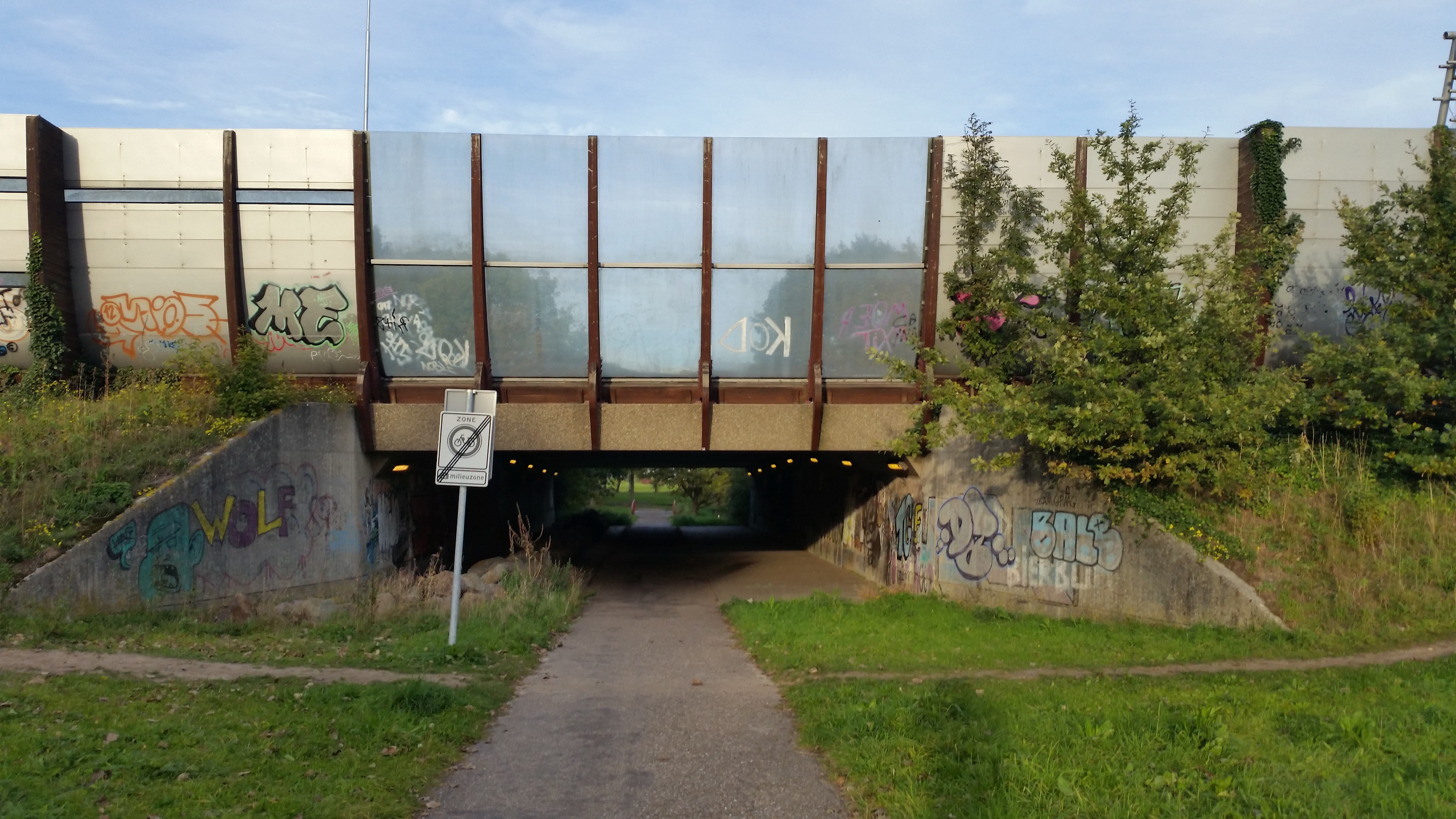 Elpermeerpadbrug, richting stad